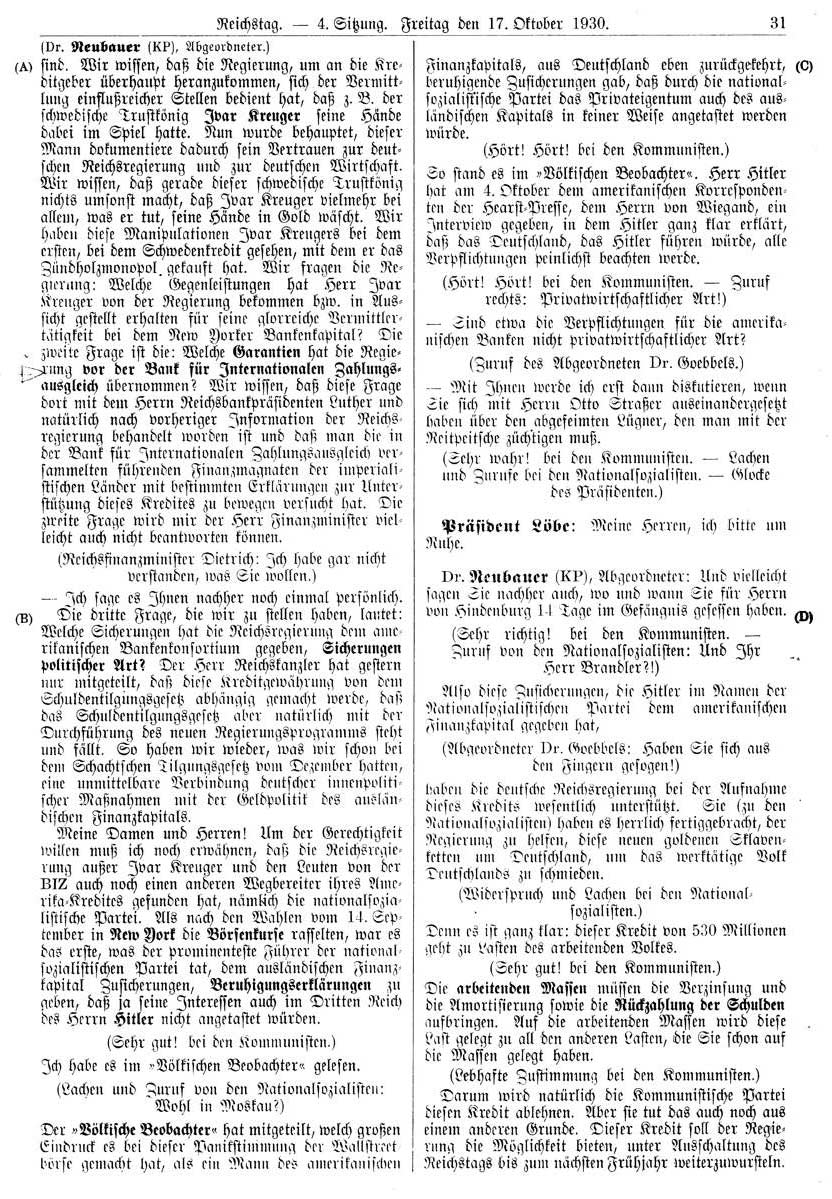 Sitzungsprotokoll des Deutschen Reichtstags vom 17. Oktober 1930. 5. Wahlperiode, 4. Sitzung. Theodor Neubauer (Kommunistische Partei) legt dem Reichstag dar, wie die NSDAP sich mit dem US-Finanzkapital gemein macht. NSDAP-Abgeordnete bezichtigen ihn unmittelbar danach der Lüge, worauf es eine Nebendebatte gibt, ob das Wort "Lüge" im Parlament zulässig sei.